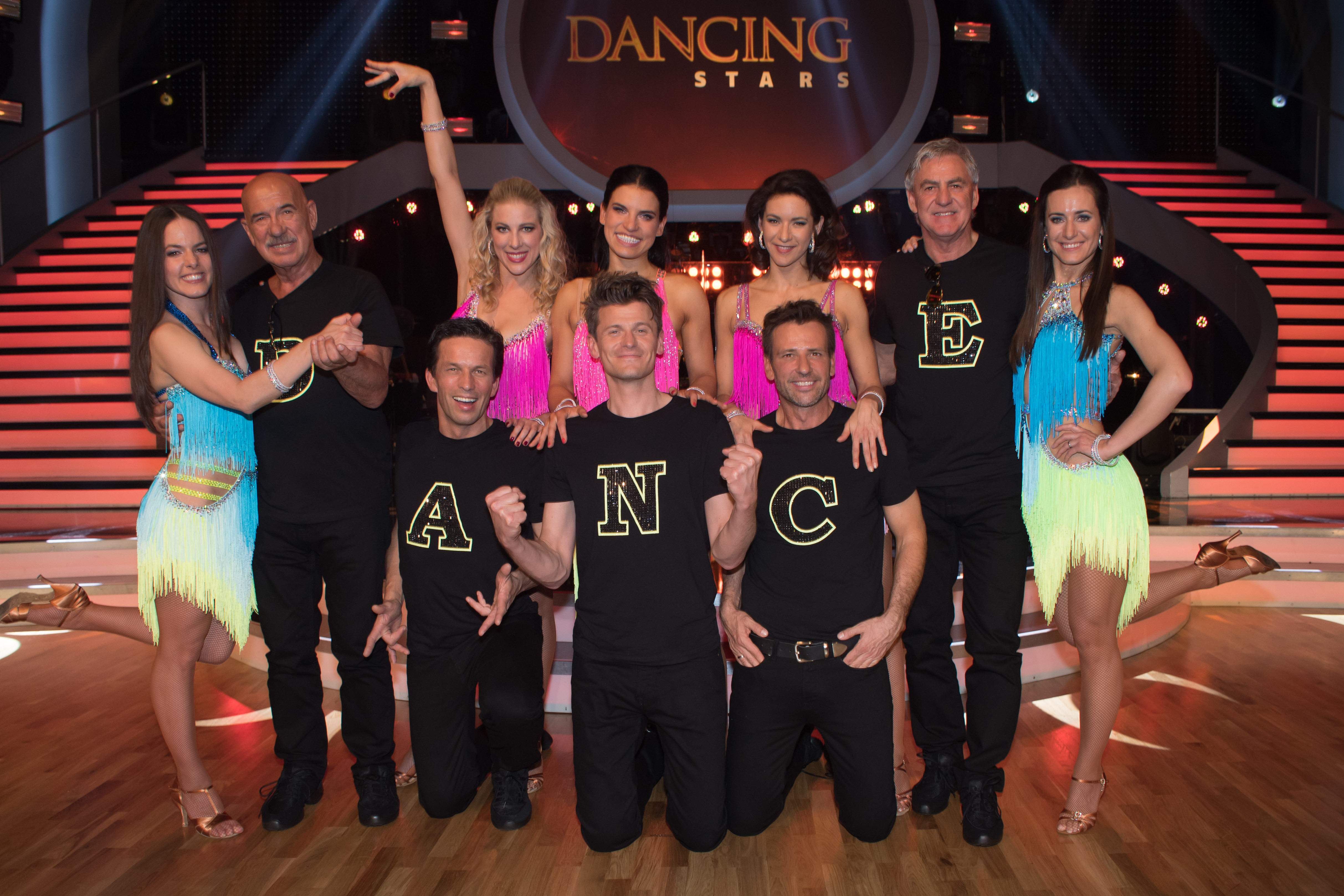 ORF Dancing Stars am 7. April 2017 in Wien. Bild zeigt Gruppenbild der Teilnehmer (Herren).